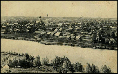 река Труёв в районе Кузнецка (конец XIX века)